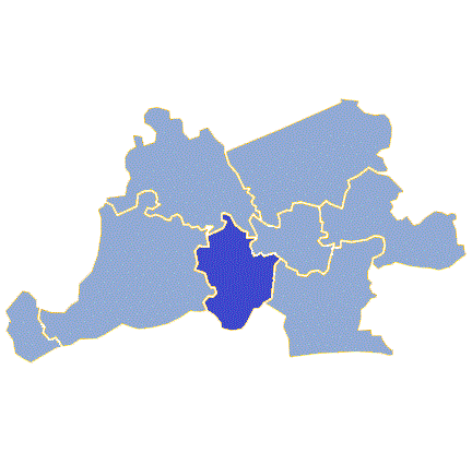 Powiat gorzowski - Gmina Bogdaniec